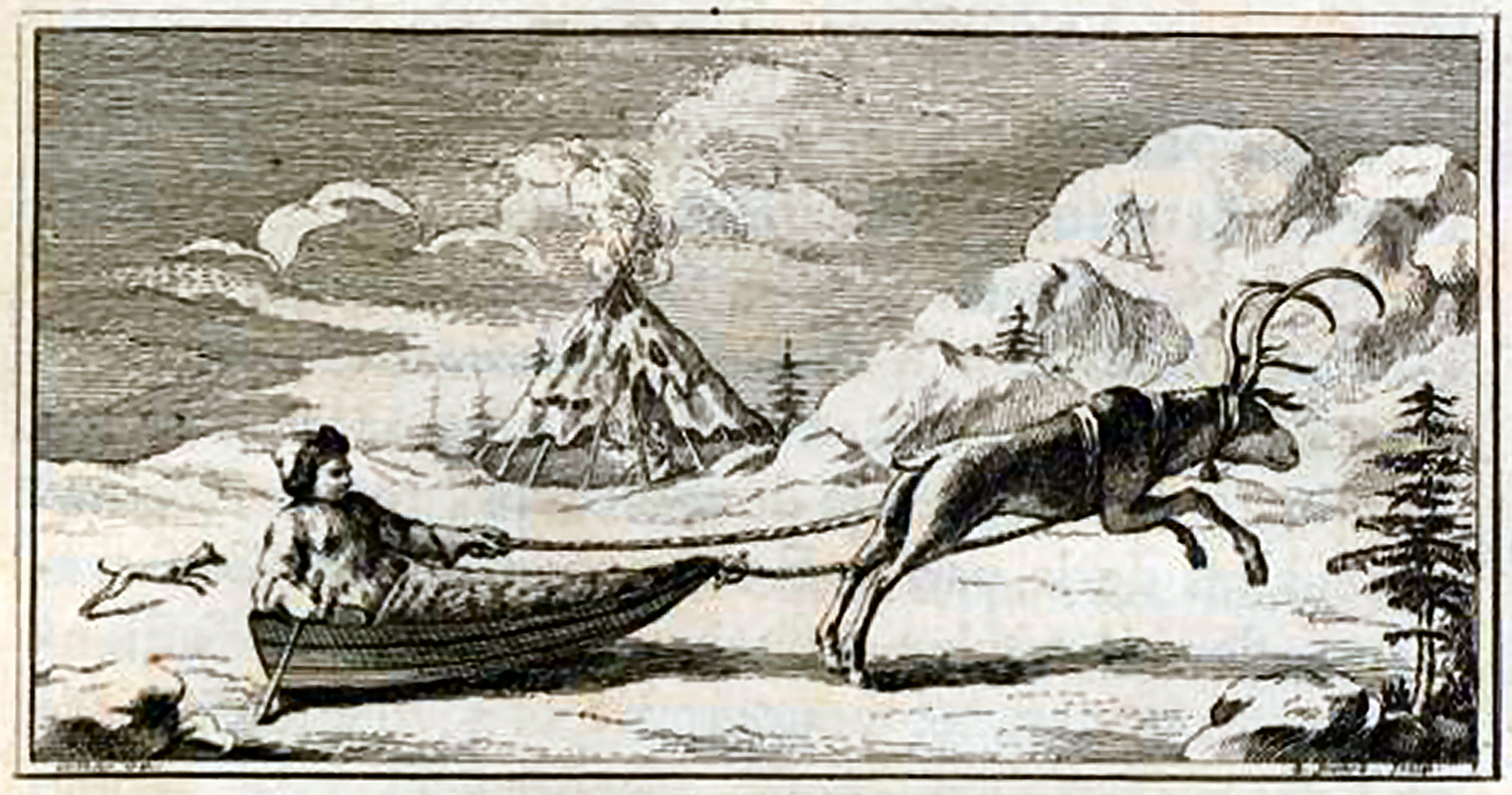 Illustration du Journal d'un voyage au Nord.